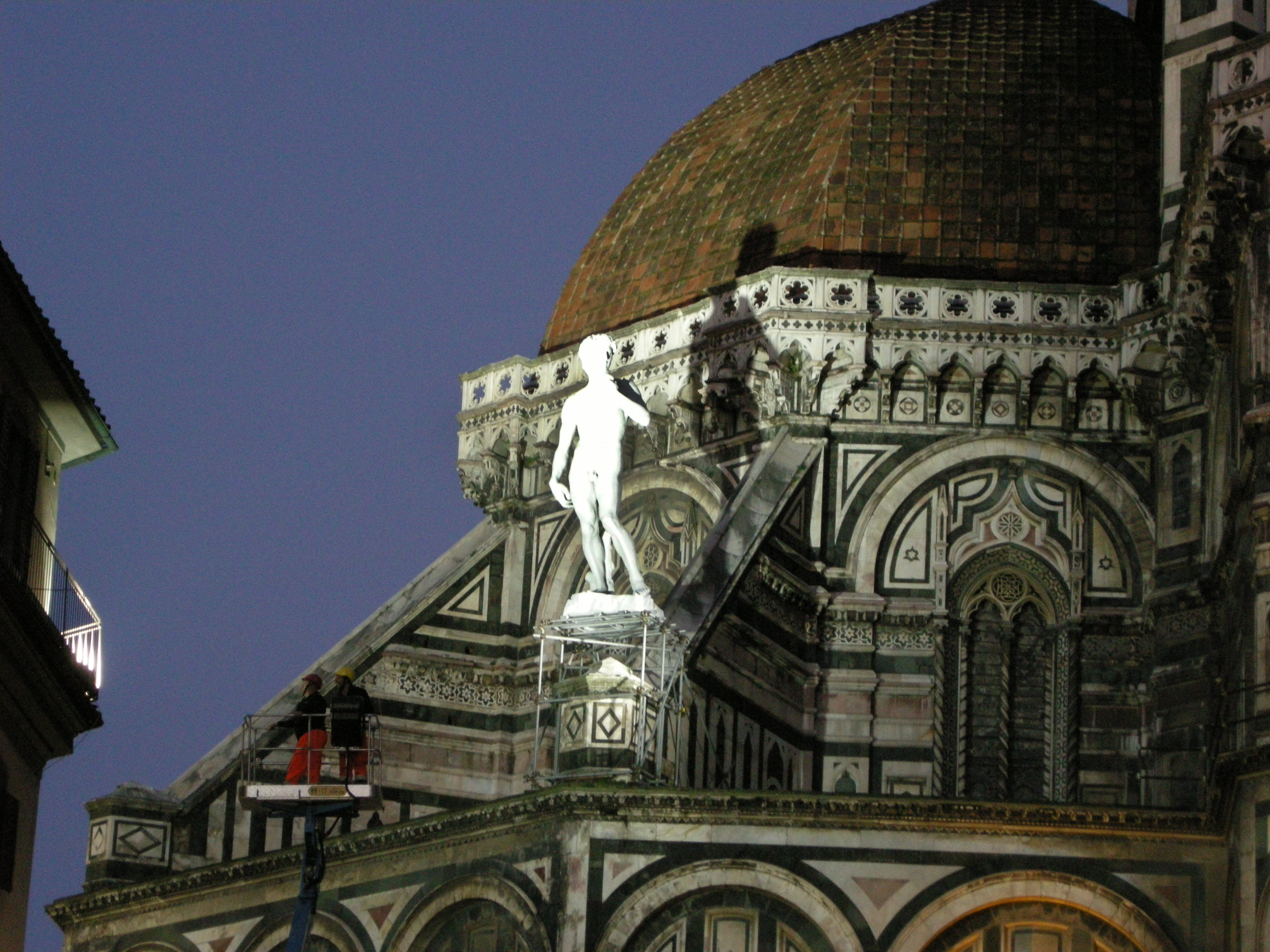 David sullo sperone del duomo di firenze